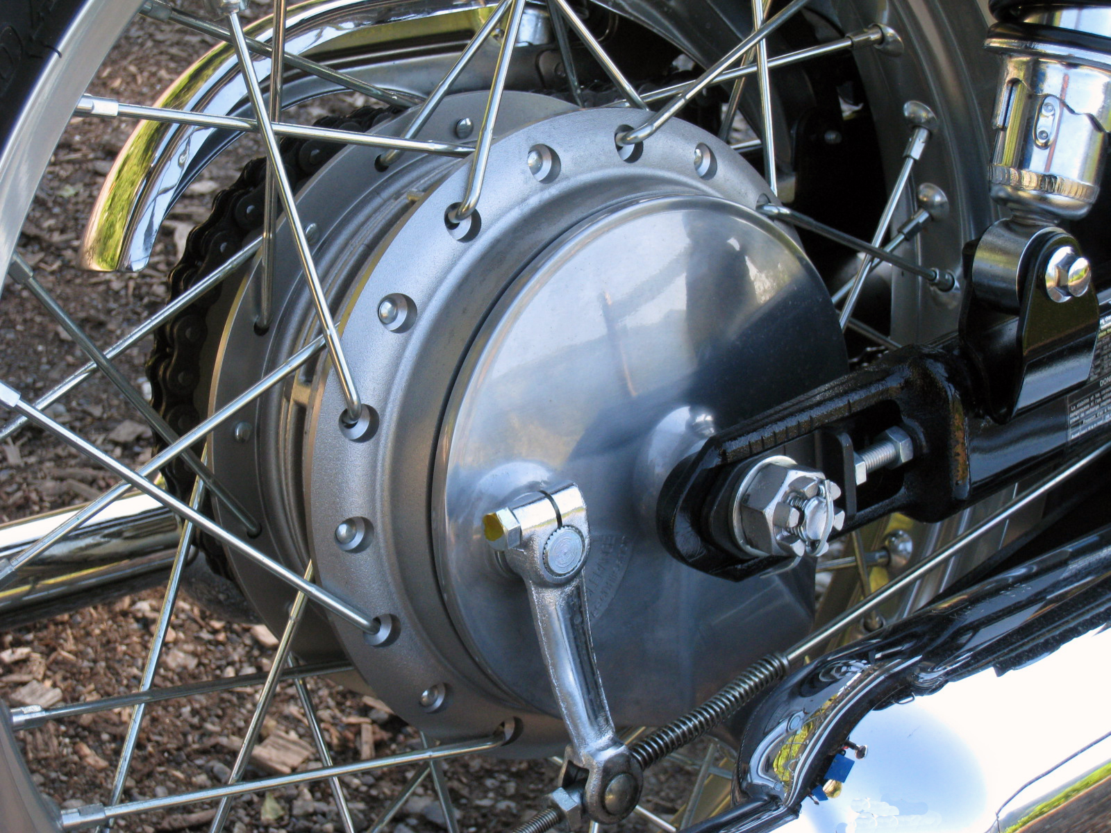 Trommelbremse bei der Kawasaki W800